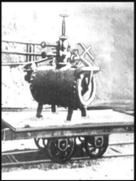 Fotografie a instalației cu reacție a lui Alexandru Ciurcu montată pe o drezină de cale ferată în 1887